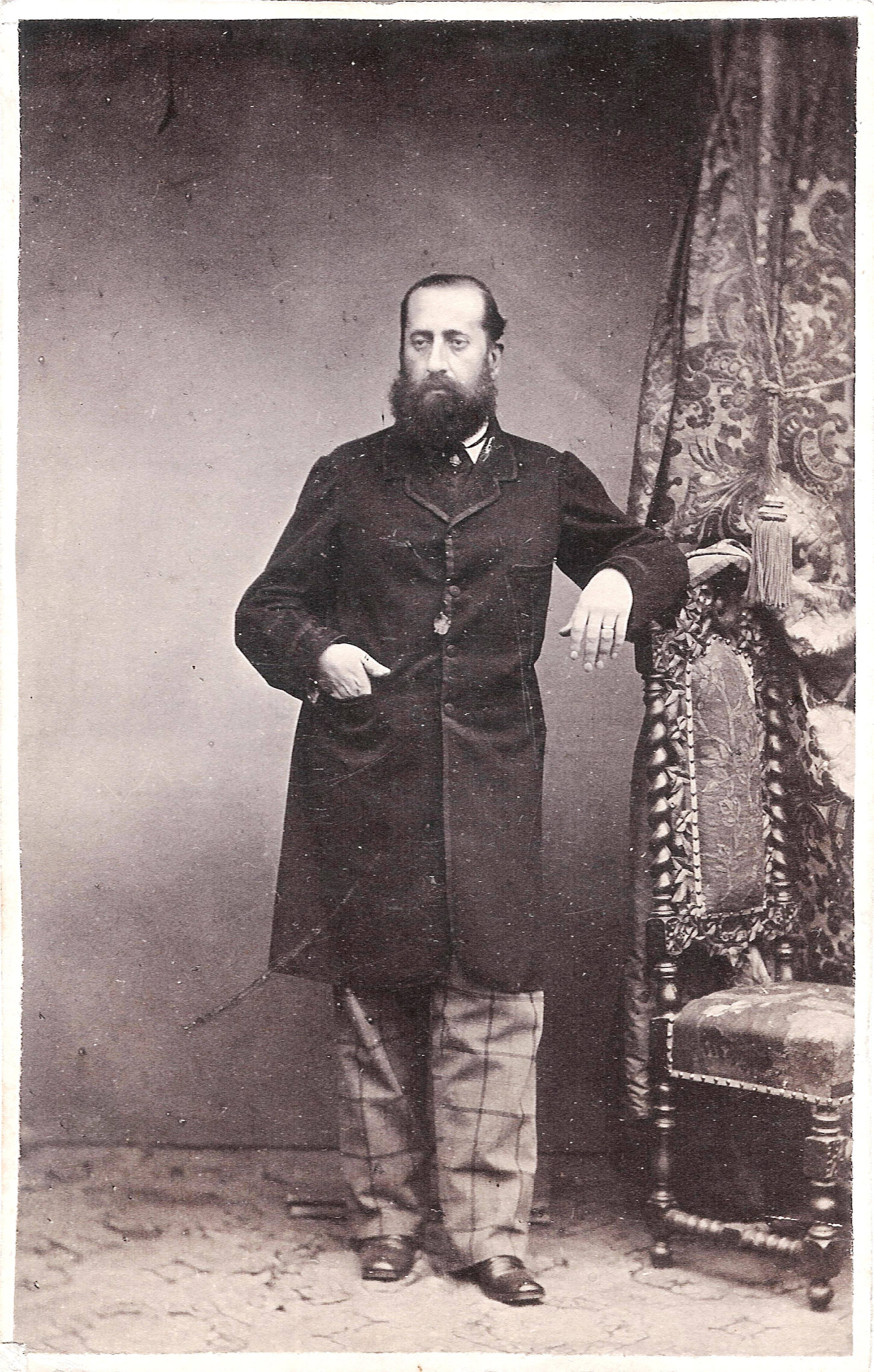 Grigore Arghiropol (1825-1892) Romanian politician